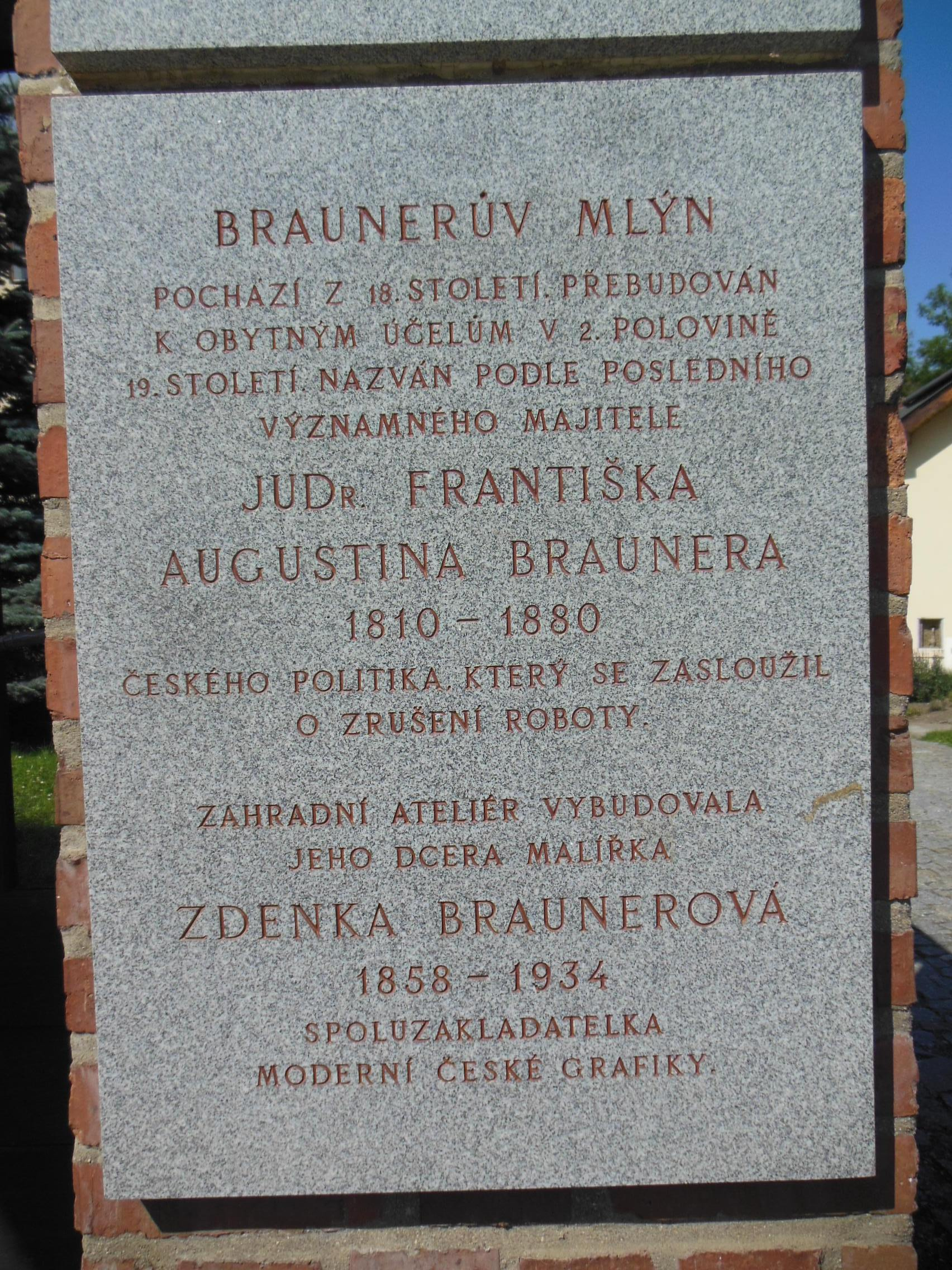 Informační deska u Braunerova mlýna v ulici Riegrova v Roztokách u Prahy.